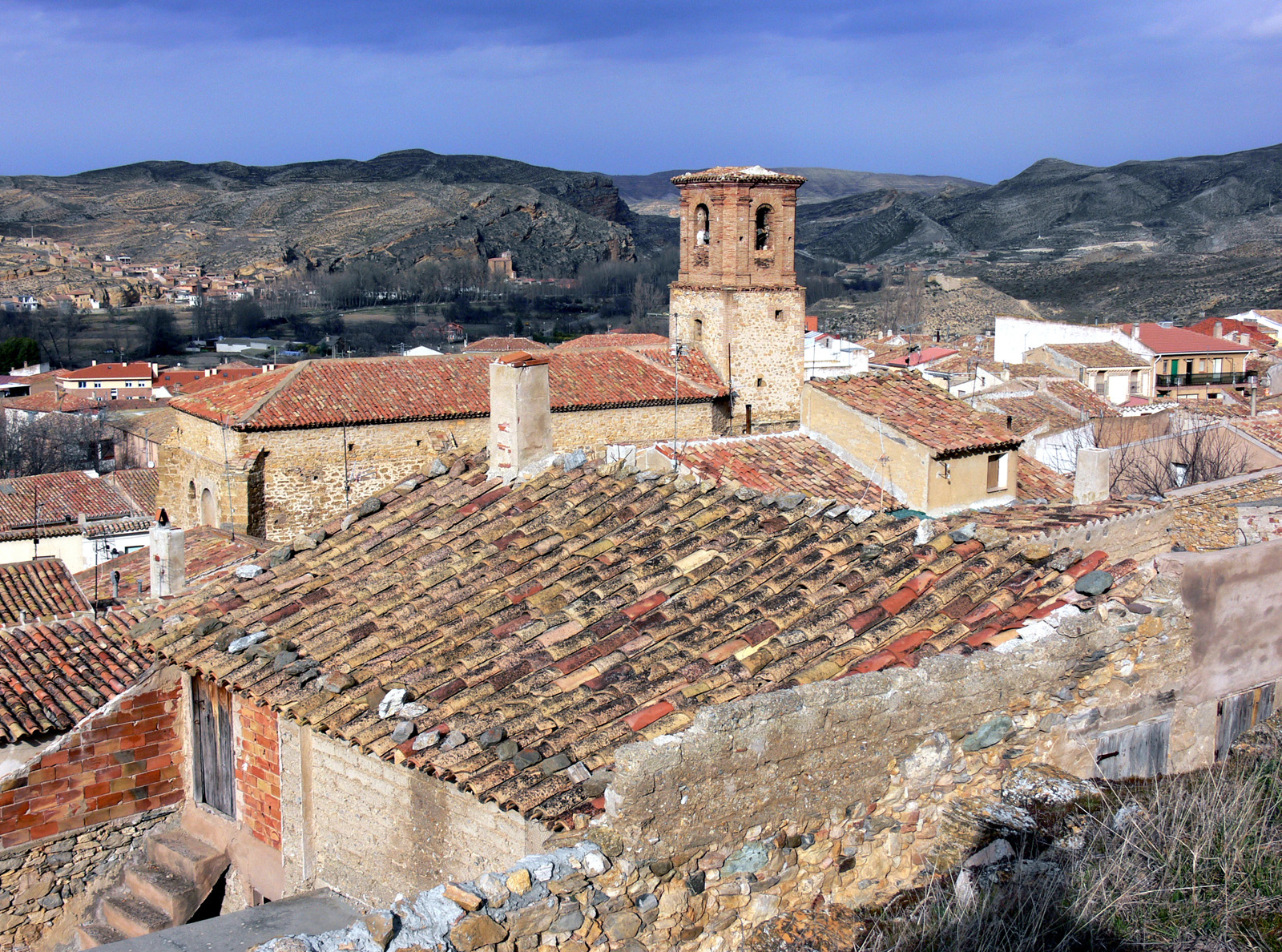 Iglesia Parroquial de la Asunción (sXVI) de Aguilar del Río Alhama.